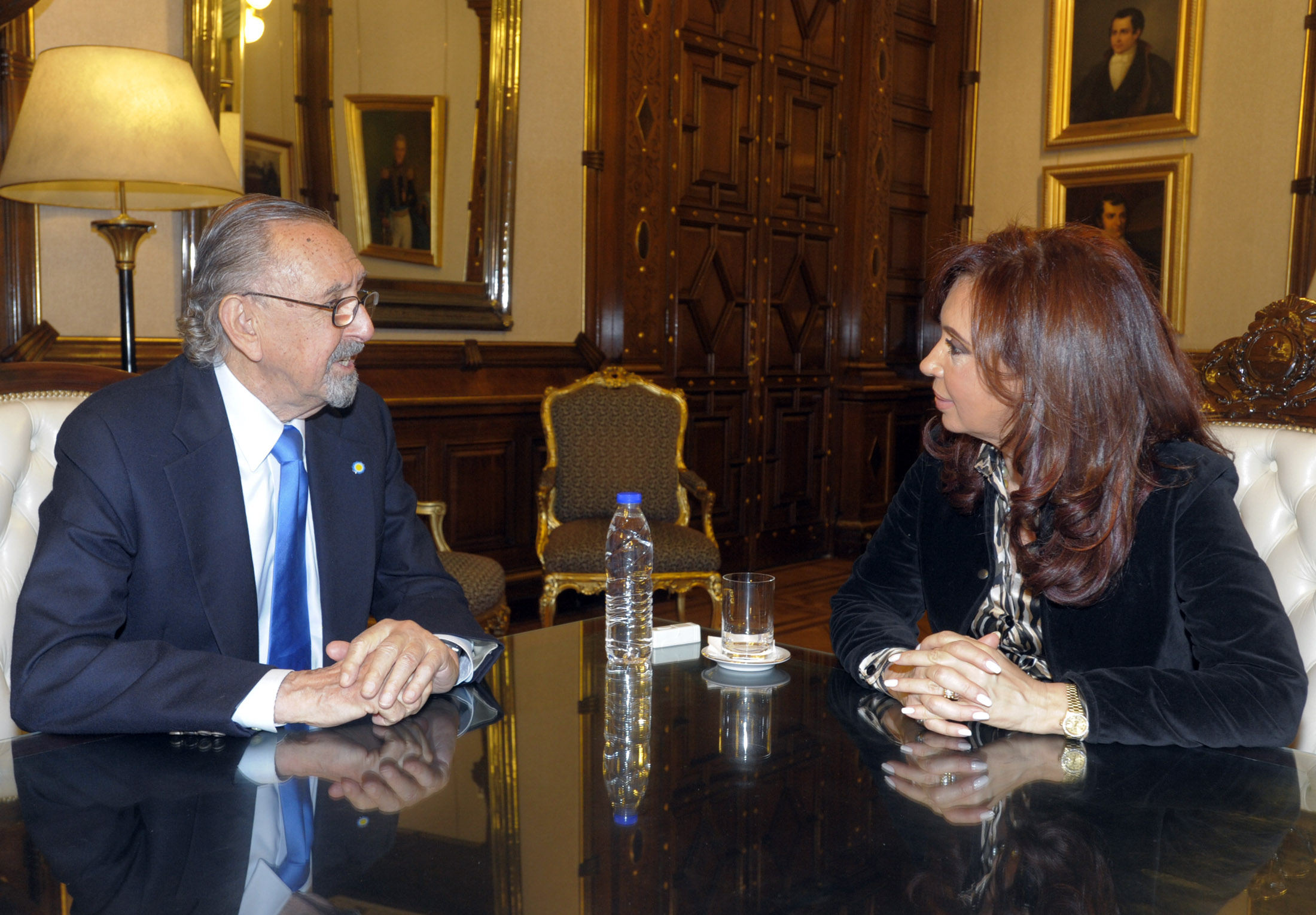 La presidenta Cristina Fernández recibió en audiencia al arquitecto César Pelli. Del encuentro, que se desarrolló en el Despacho Presidencial de Casa Rosada, participó el ministro de Planificación Federal, Inversión Pública y Servicios, Julio De Vido.